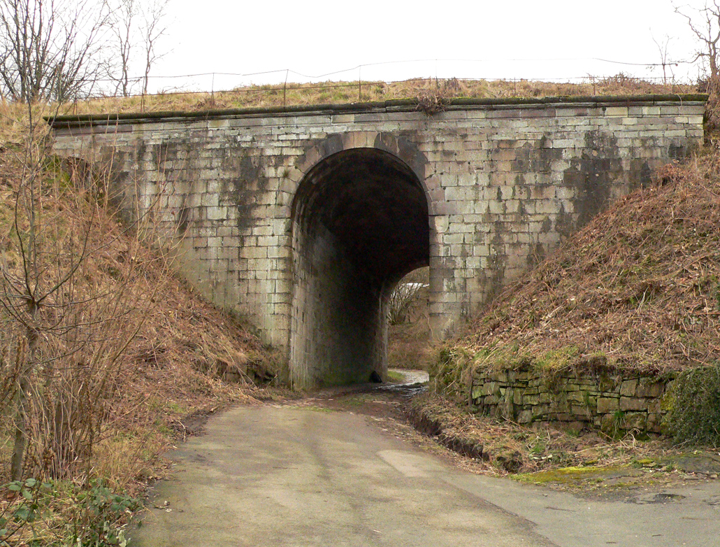 1855 aus Kalkbruch- und Sandstein erbaute Unterführung der Dransfelder Rampe nördlich des Stadtkerns von Hann. Münden für einen Weg mit Wegpflasterung von 1855